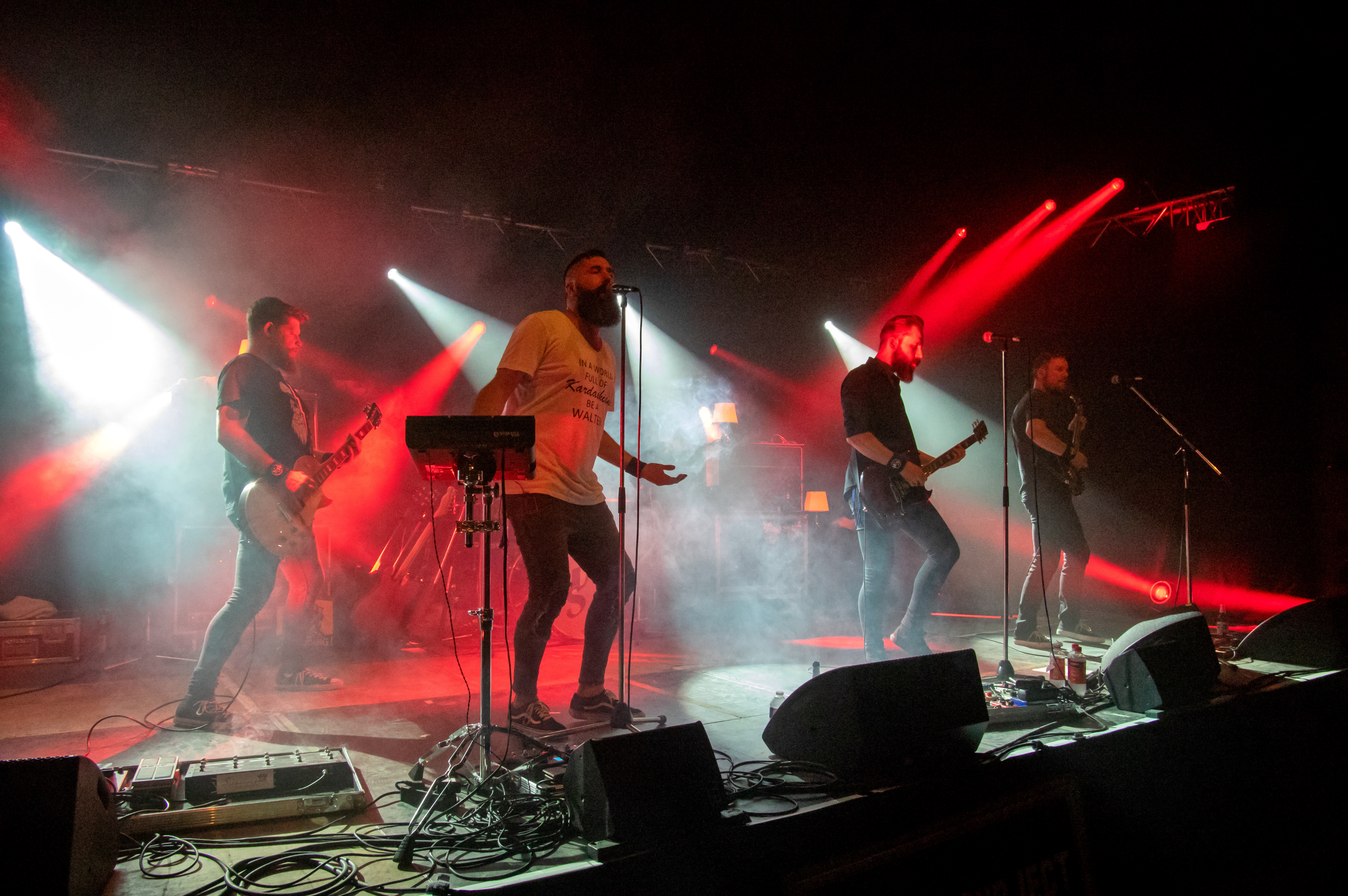 Bilder vom Zelt Musik Festival 2018 in Freiburg im Breisgau Auftritt Walter Subject am 20. Juli 2018 auf der Aktionbühne